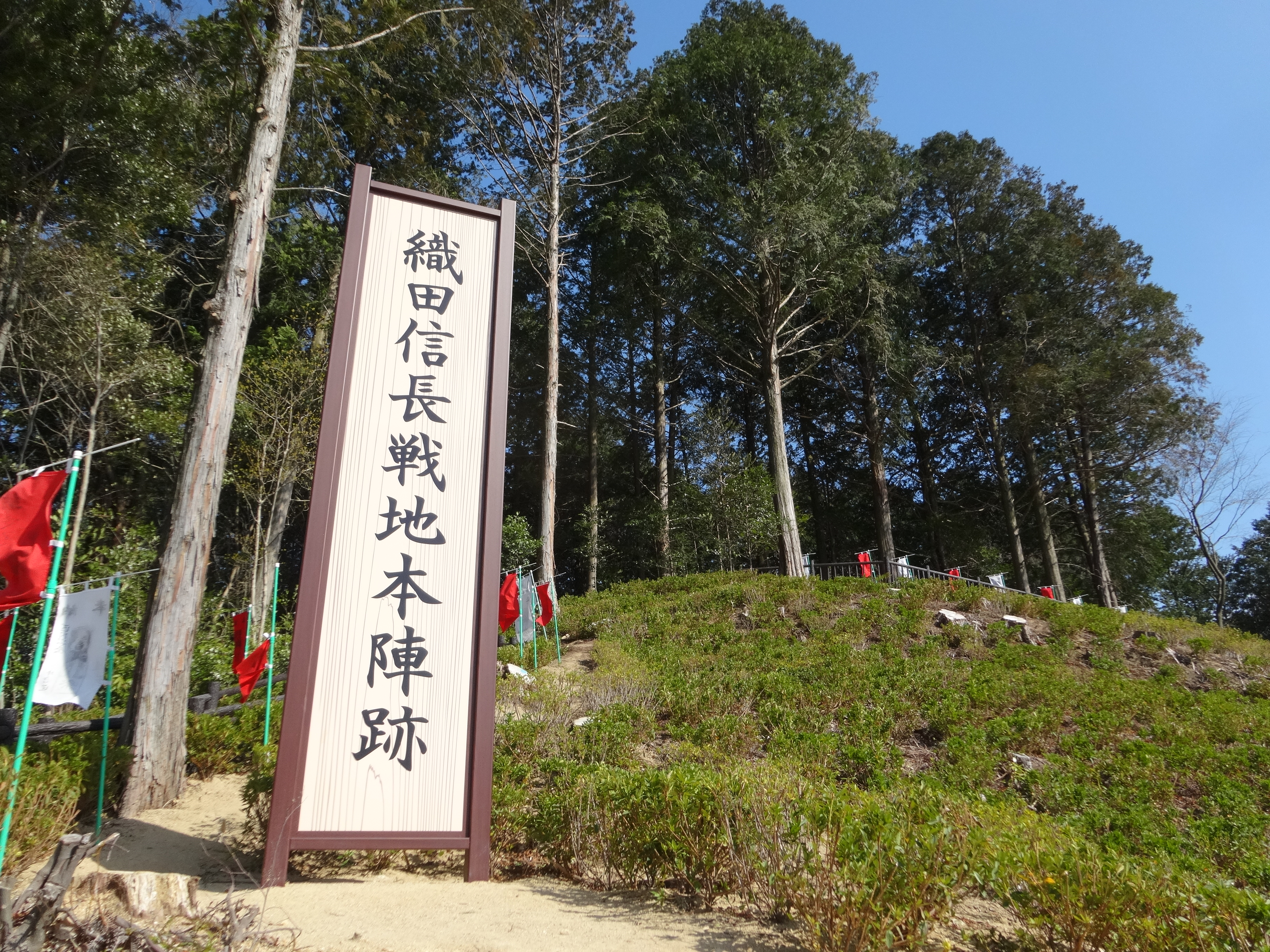 合戦本陣跡